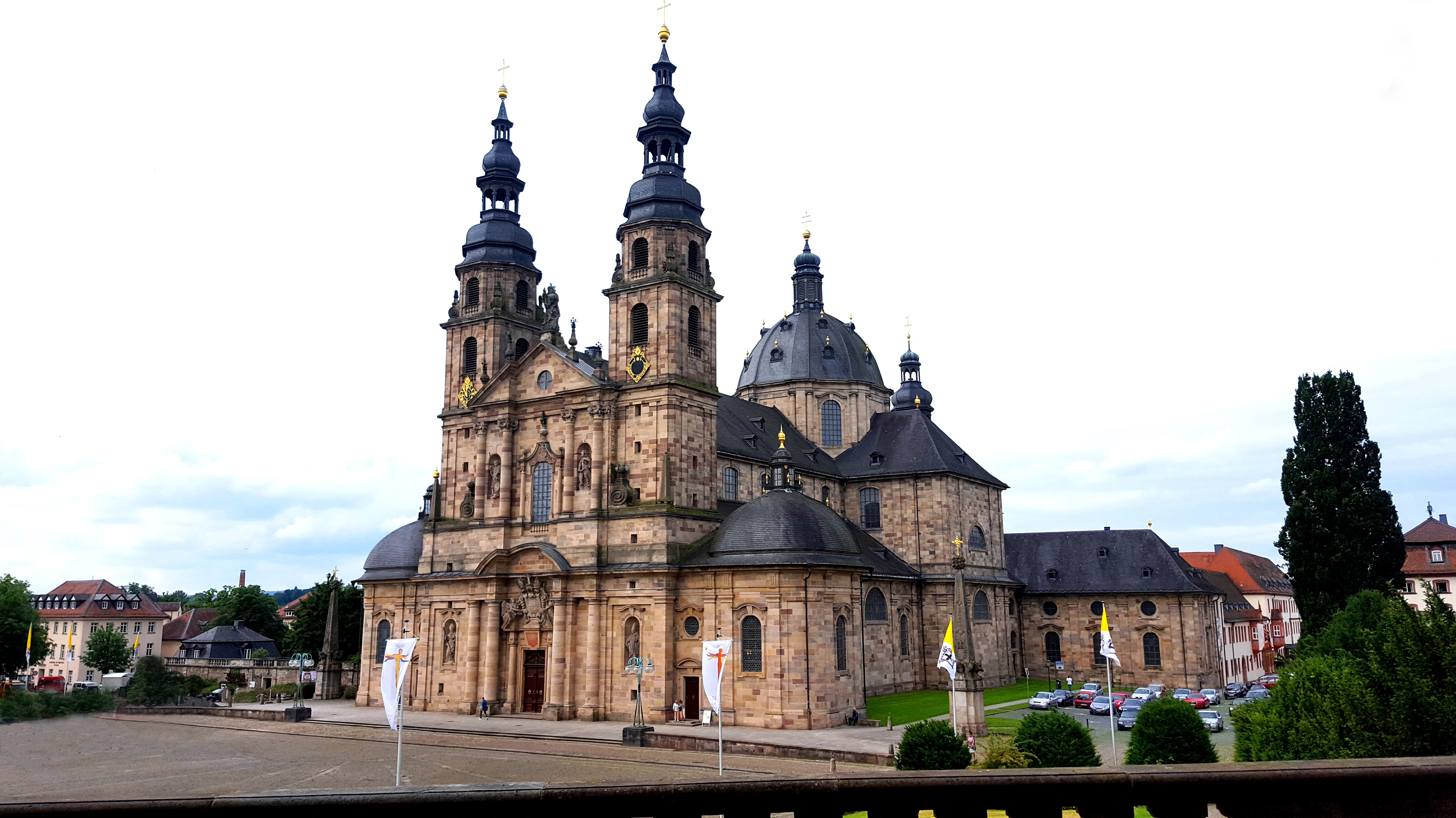 Der Dom zu Fulda im Sommer 2018. Auf dem Vorplatz finden im Sommer regelmäßig Openairkonzerte statt.